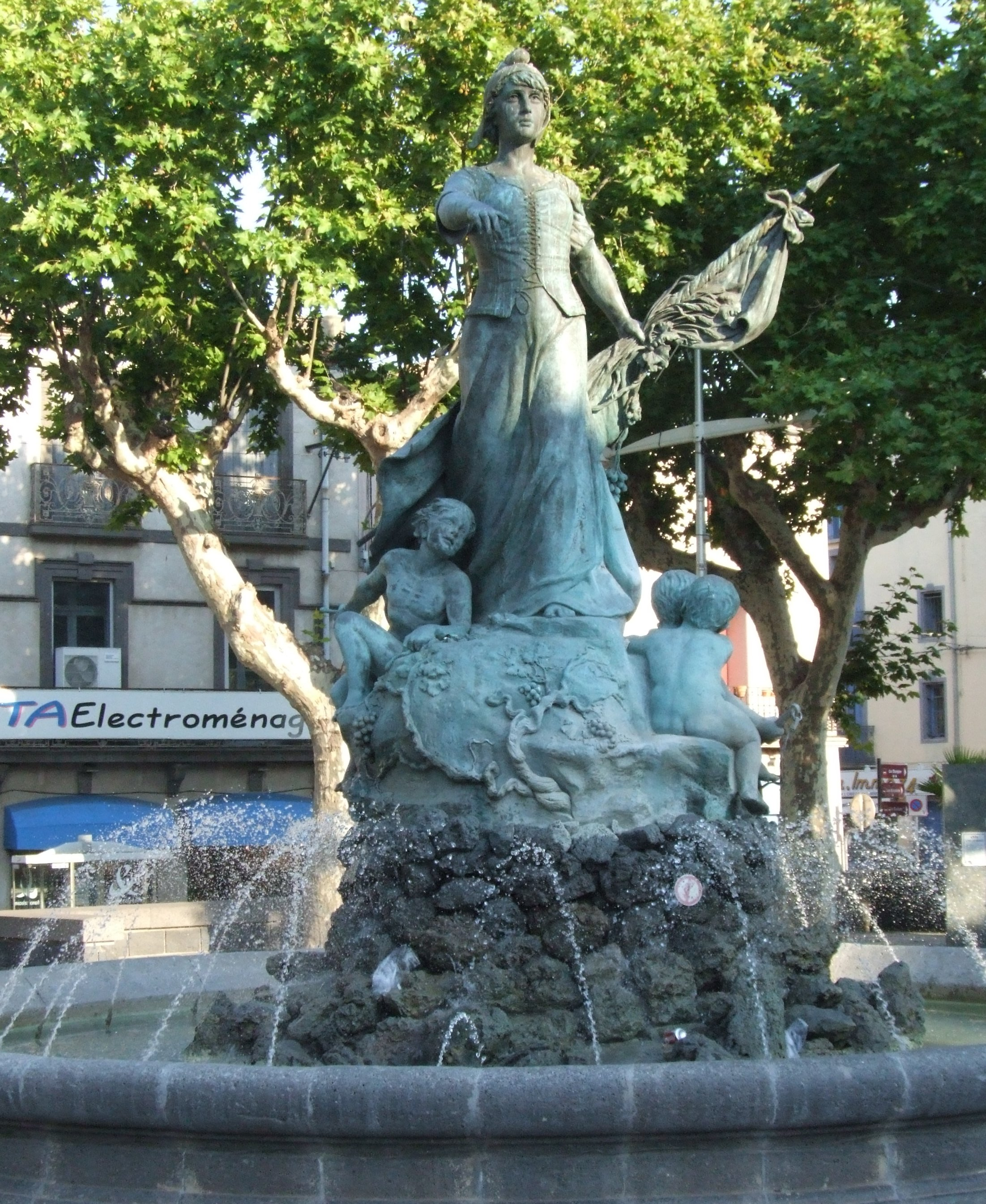 Statue À la Gloire de la République (1909) aussi appelée Fontaine de la République, Place du 18-juin, Agde (Hérault - France) - copie conforme de la statue de Jacques Villeneuve qui a été fondue en 1941 sur ordre du gouvernement de Vichy.